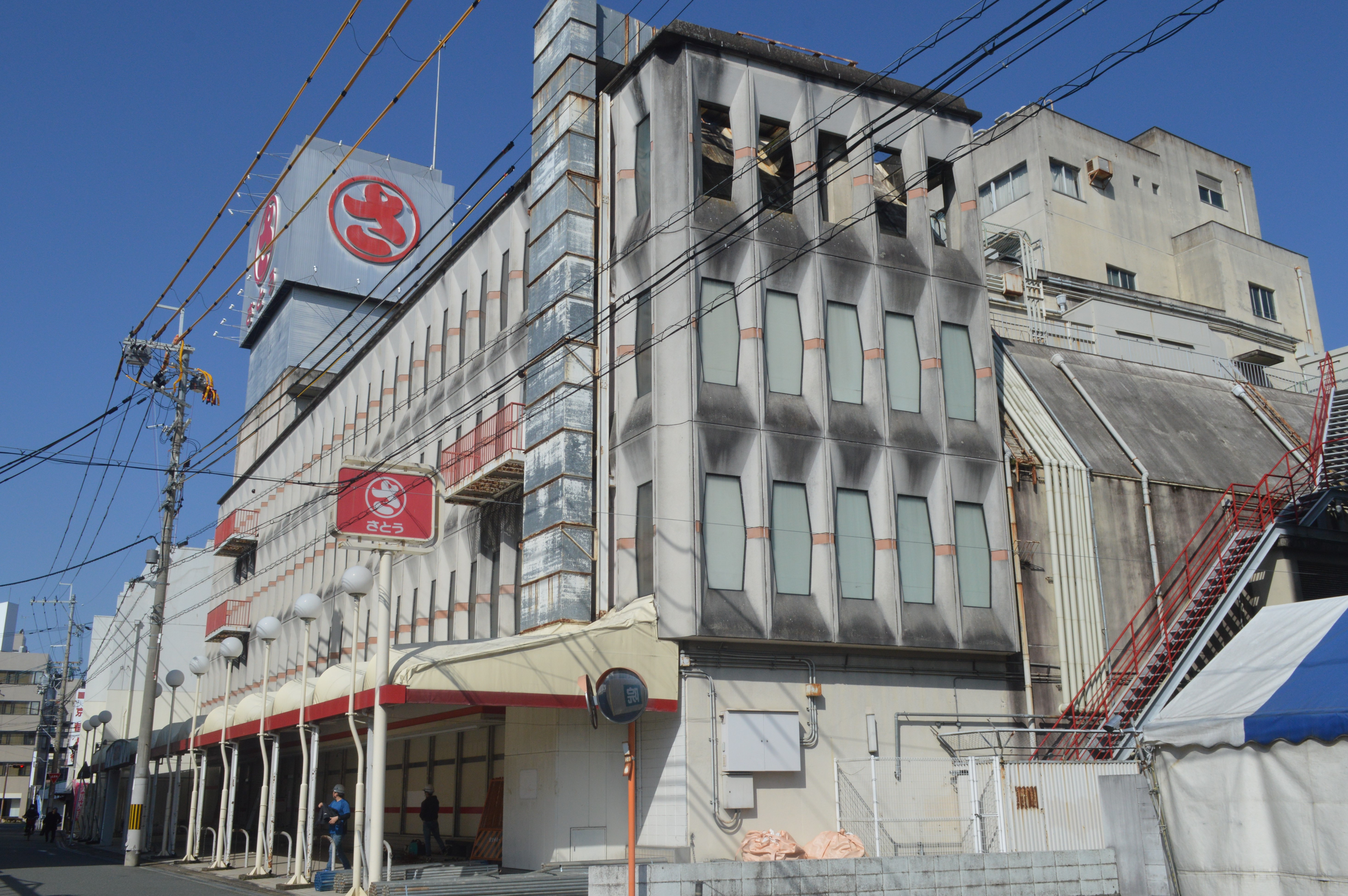 京都府福知山市駅前町にあるさとう福知山駅前店。2019年11月閉店。